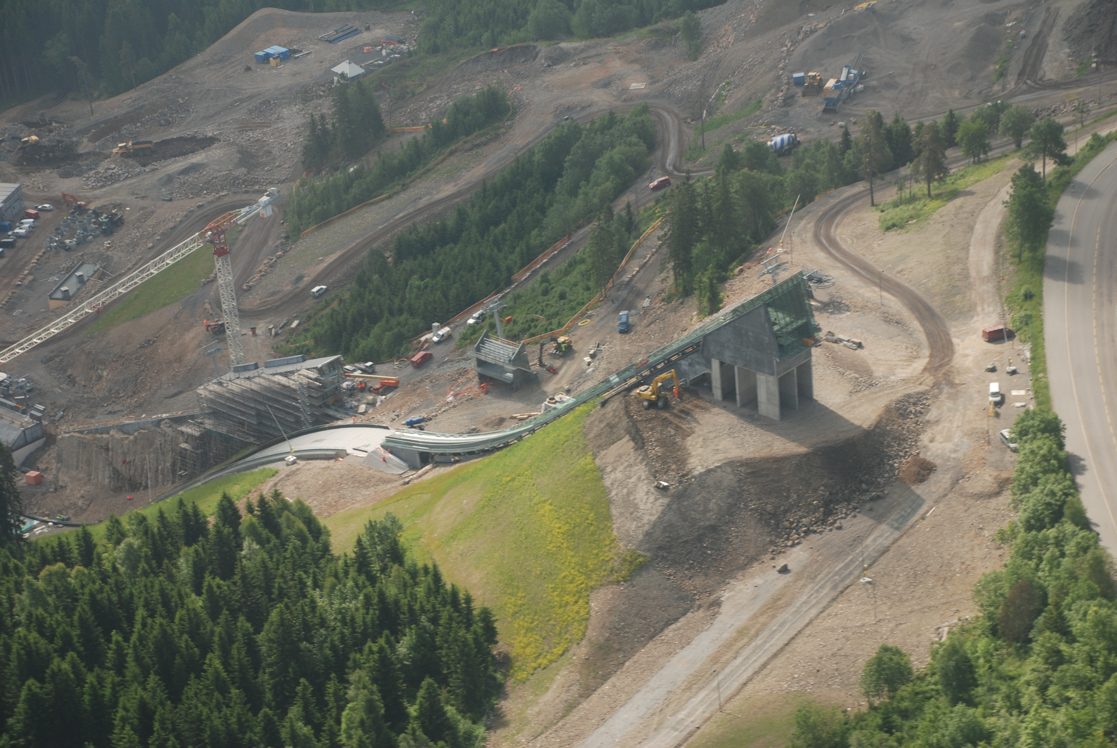 Midtstubakken ski jumping hill in Oslo, Norway. (Not Holmenkollbakken.)